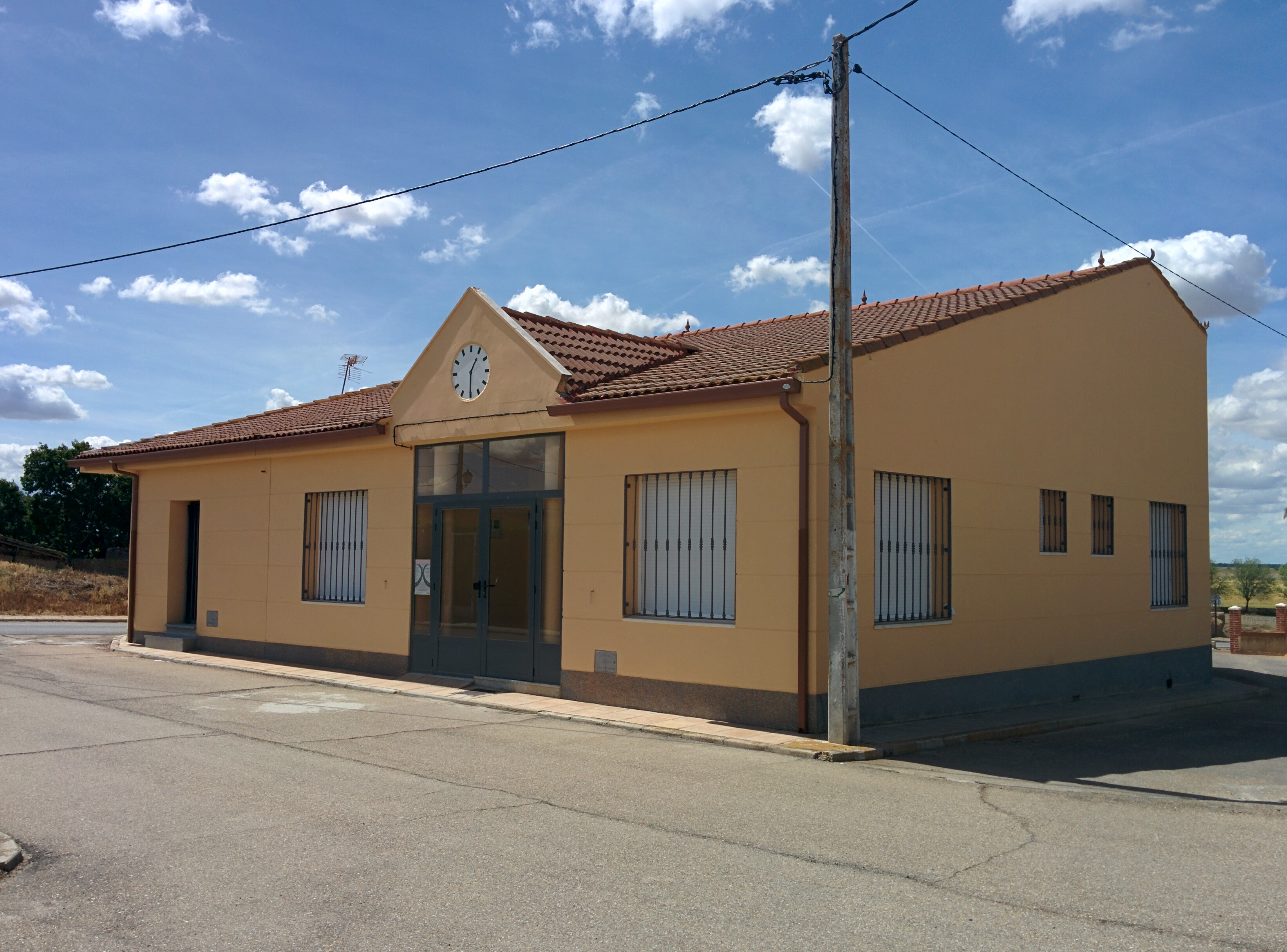 Casa consistorial de Blasconuño de Matacabras (Ávila, España).